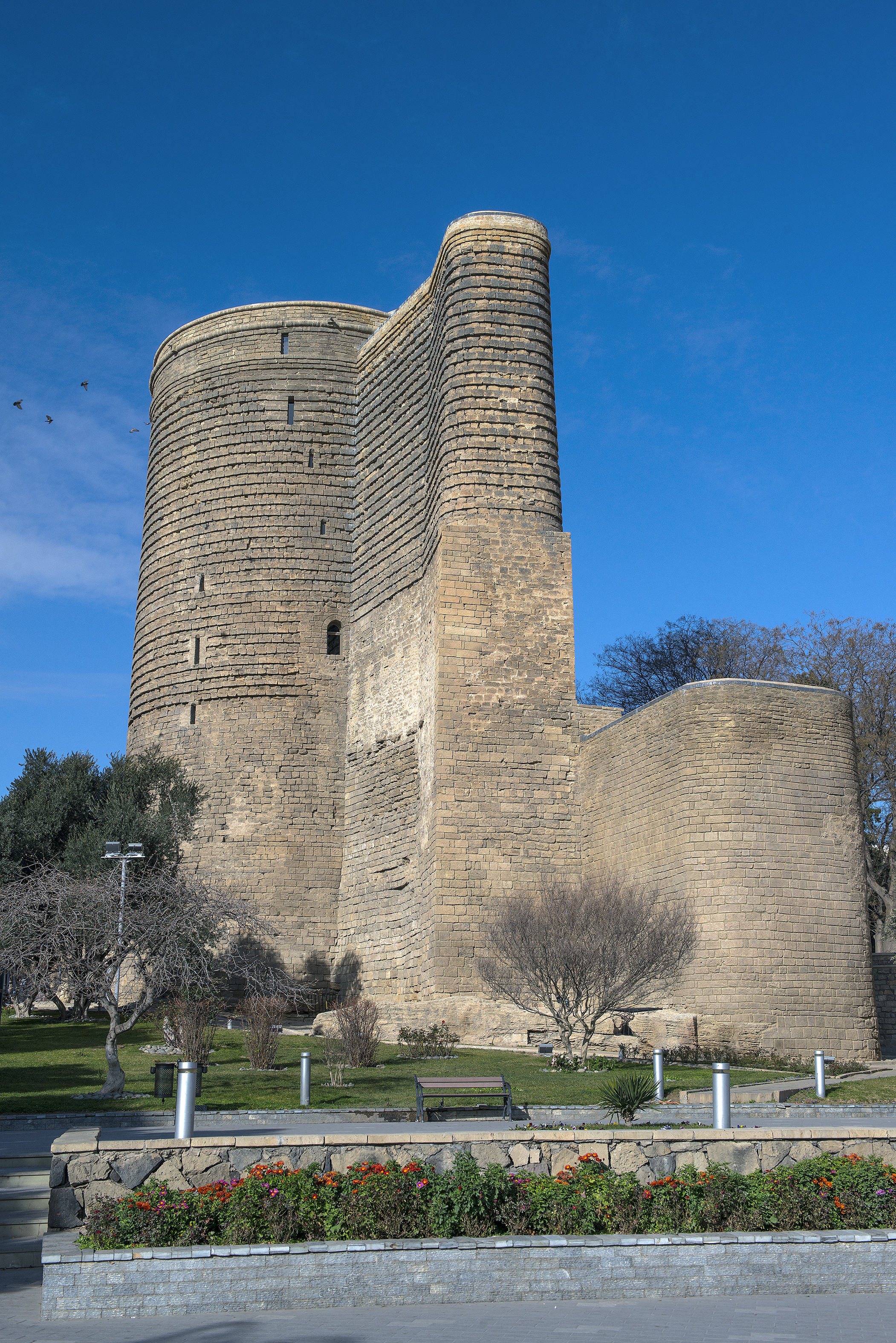 Qız qalası 2014